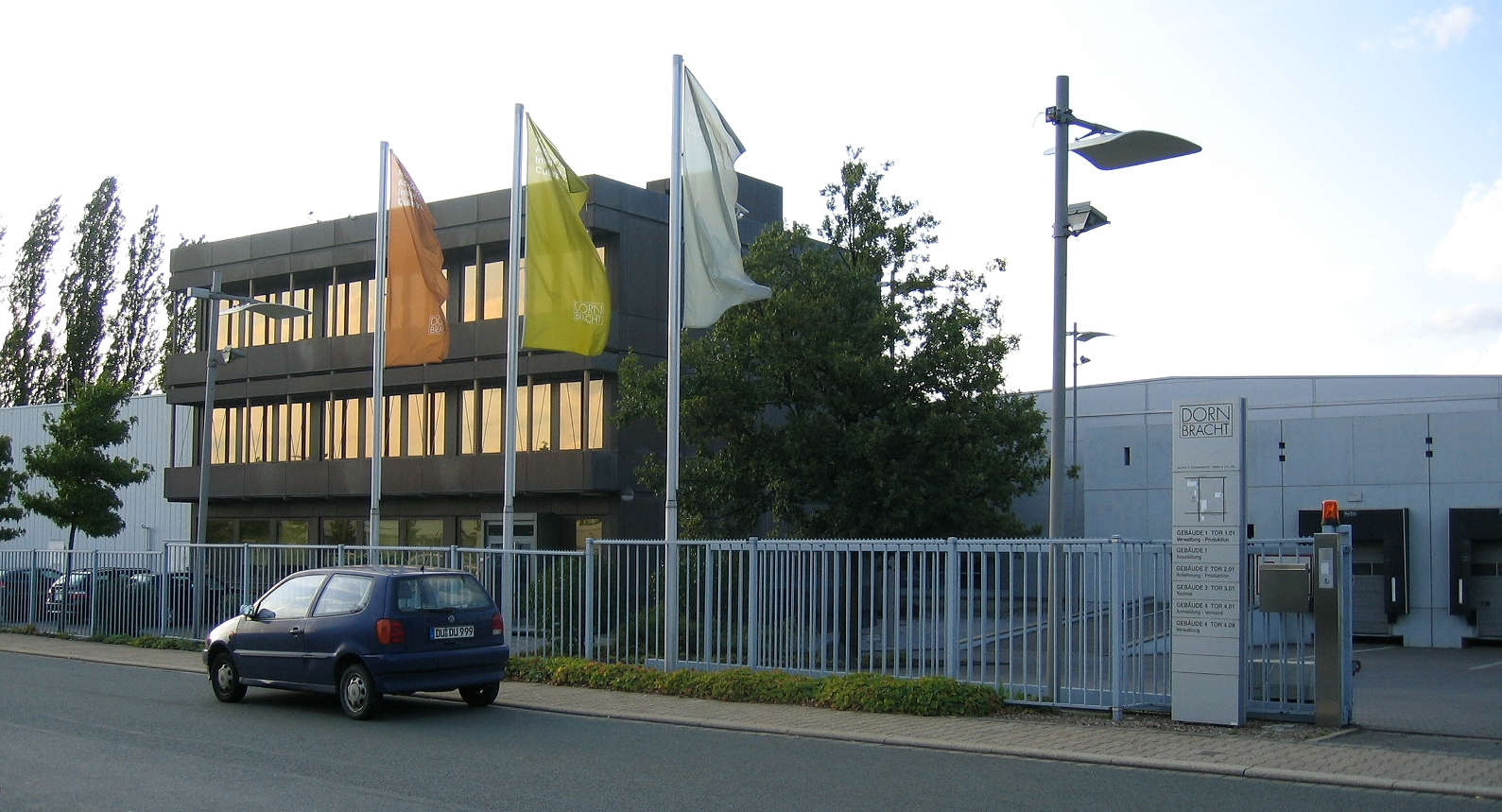 Dornbracht in Iserlohn-Sümmern.